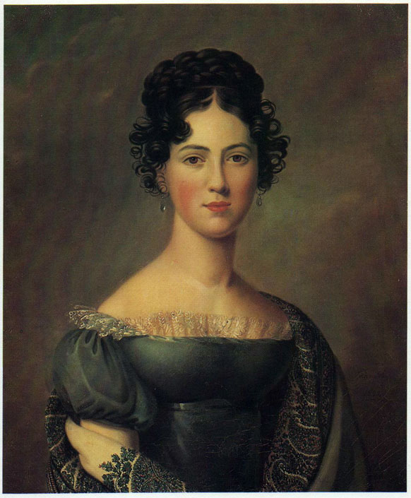 Княгиня Екатерина Дмитриевна Долгорукова (1801-1877/81) ур.Голицына, с 1821 года жена князя Н.В.Долгорукого (1789-1872), внучка кн. Н.П.Голицыной.